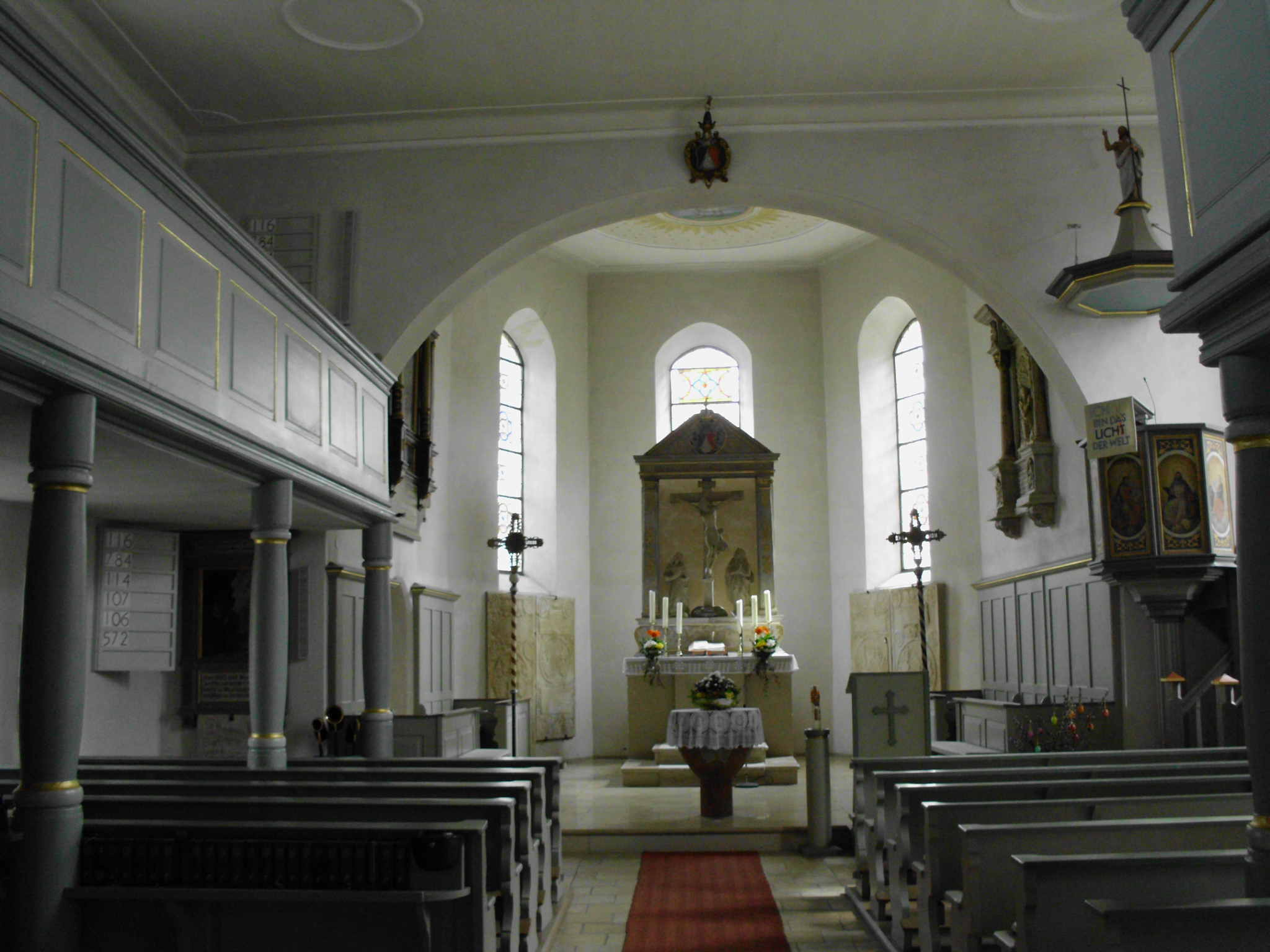 Absberg, Landkreis Weißenburg-Gunzenhausen (Bayern), evang.-luth. Christuskirche, Innenraum, Blick zum Chor im Osten hin